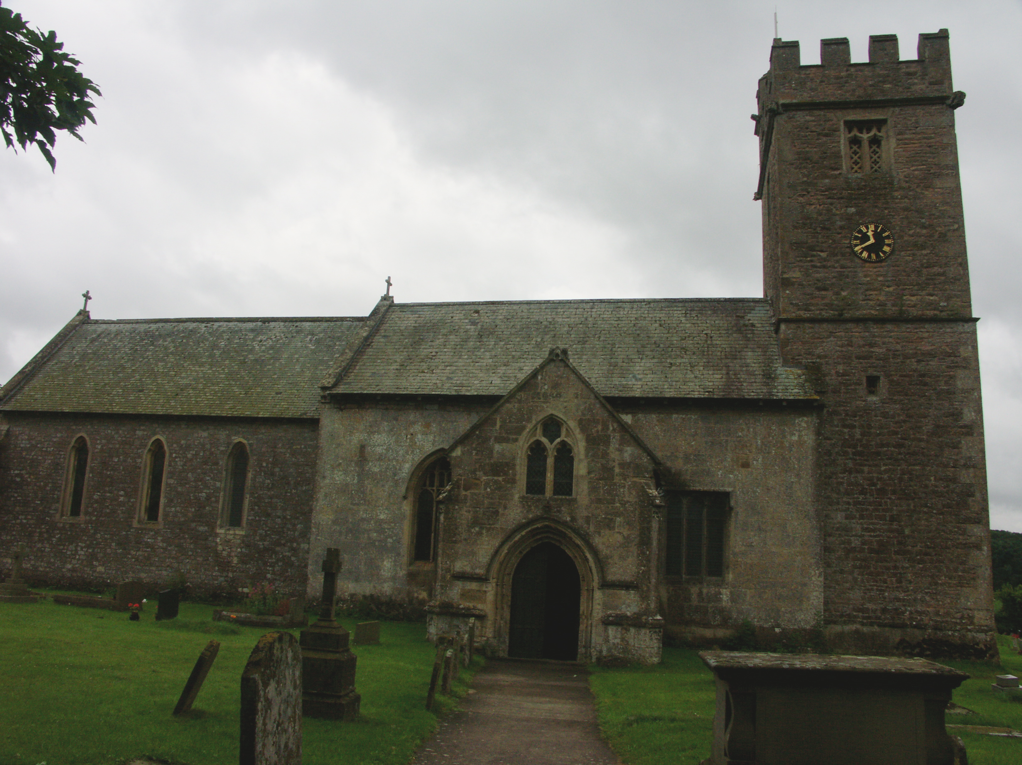 St. Stephen's Church, Caerwent